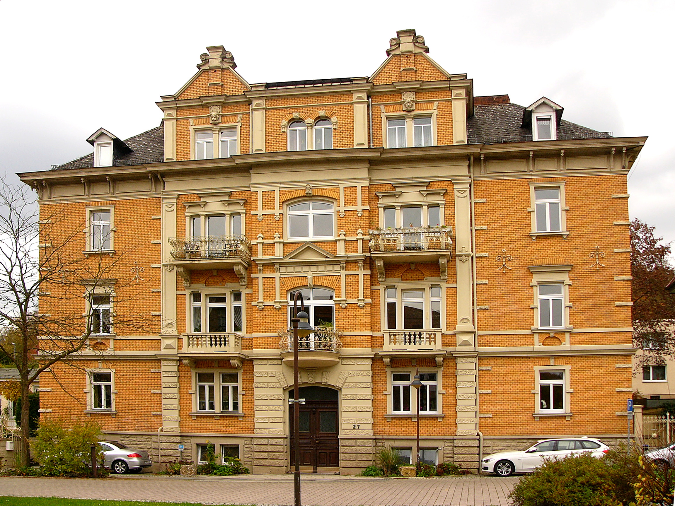 Ehemals Kurheim; dreigeschossiger Klinkerbau mit abgeschnittenem Walmdach, Zwerchhäusern mit Ziergiebeln und Sandsteingliederung, in Formen der Neorenaissance, von K. Weinschenk, bezeichnet 1891. This is a photograph of an architectural monument.